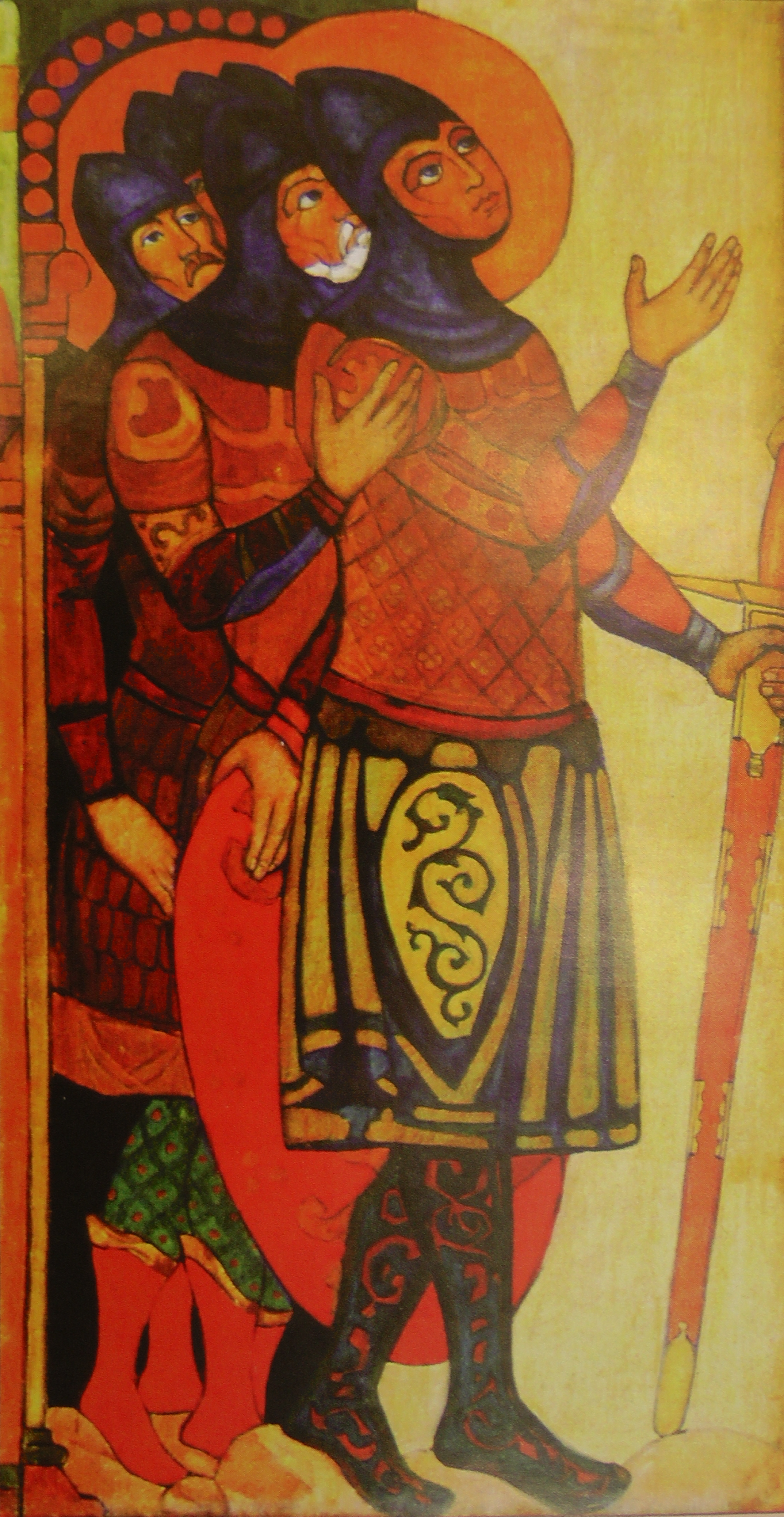 Николай Рерих. Святые воины. Эскиз к росписи интерьера храма Святого Духа в Талашкино. Баку.